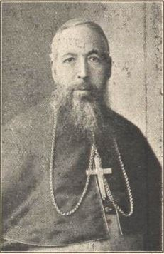 Cardinal Philippe Camassei (1848-1921), patriarche latin de Jérusalem